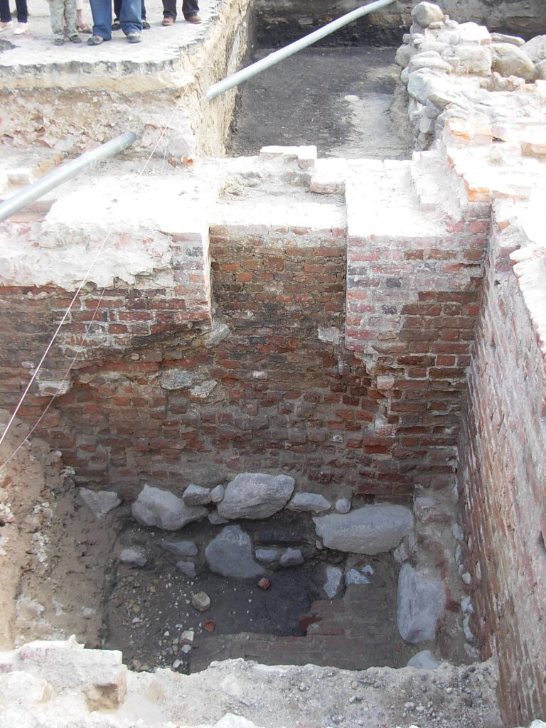 Fragmenty piwnic starego ratusza na Starym Rynku w Bydgoszczy